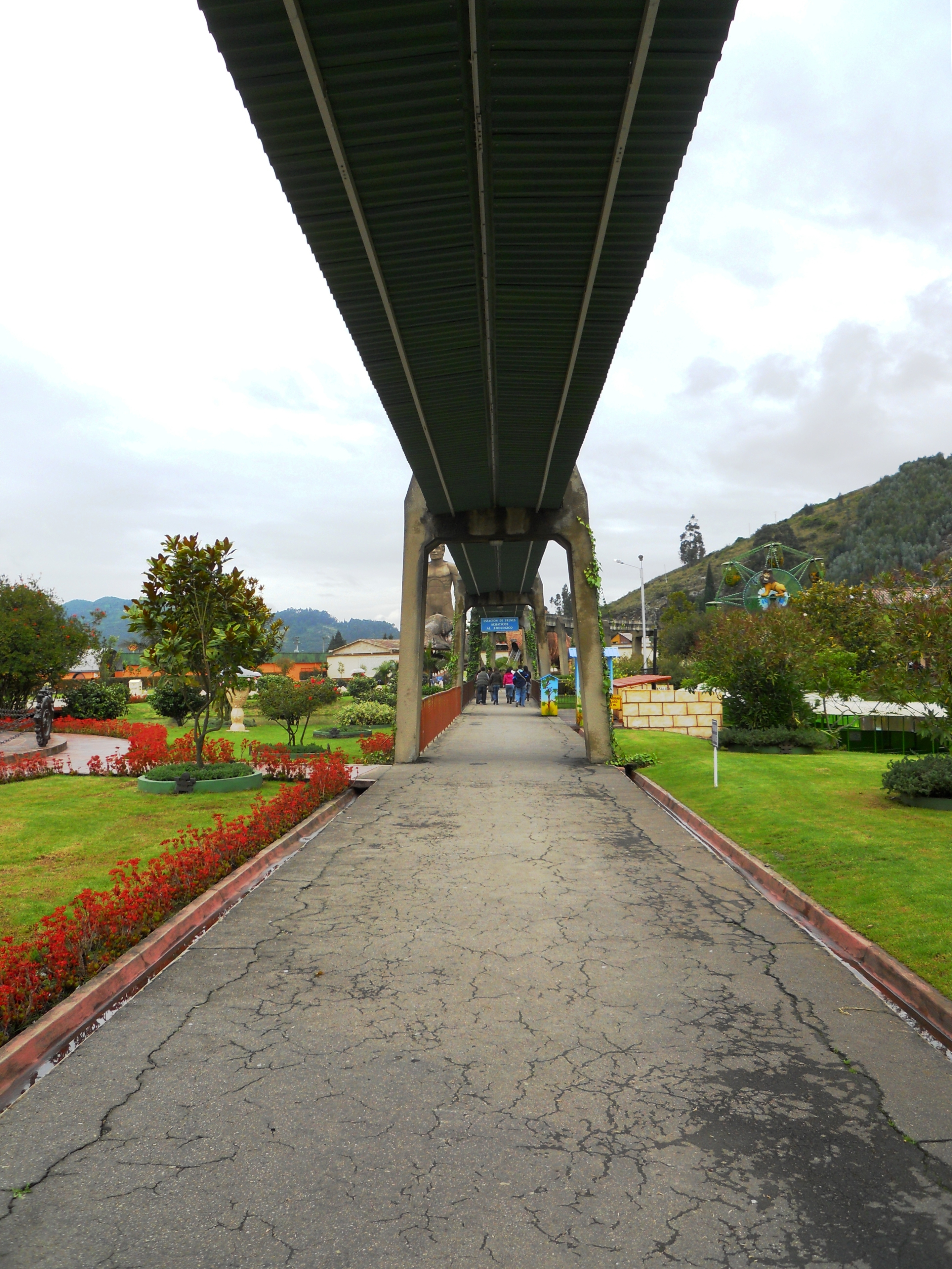 Monorriel del Parque Jaime Duque.